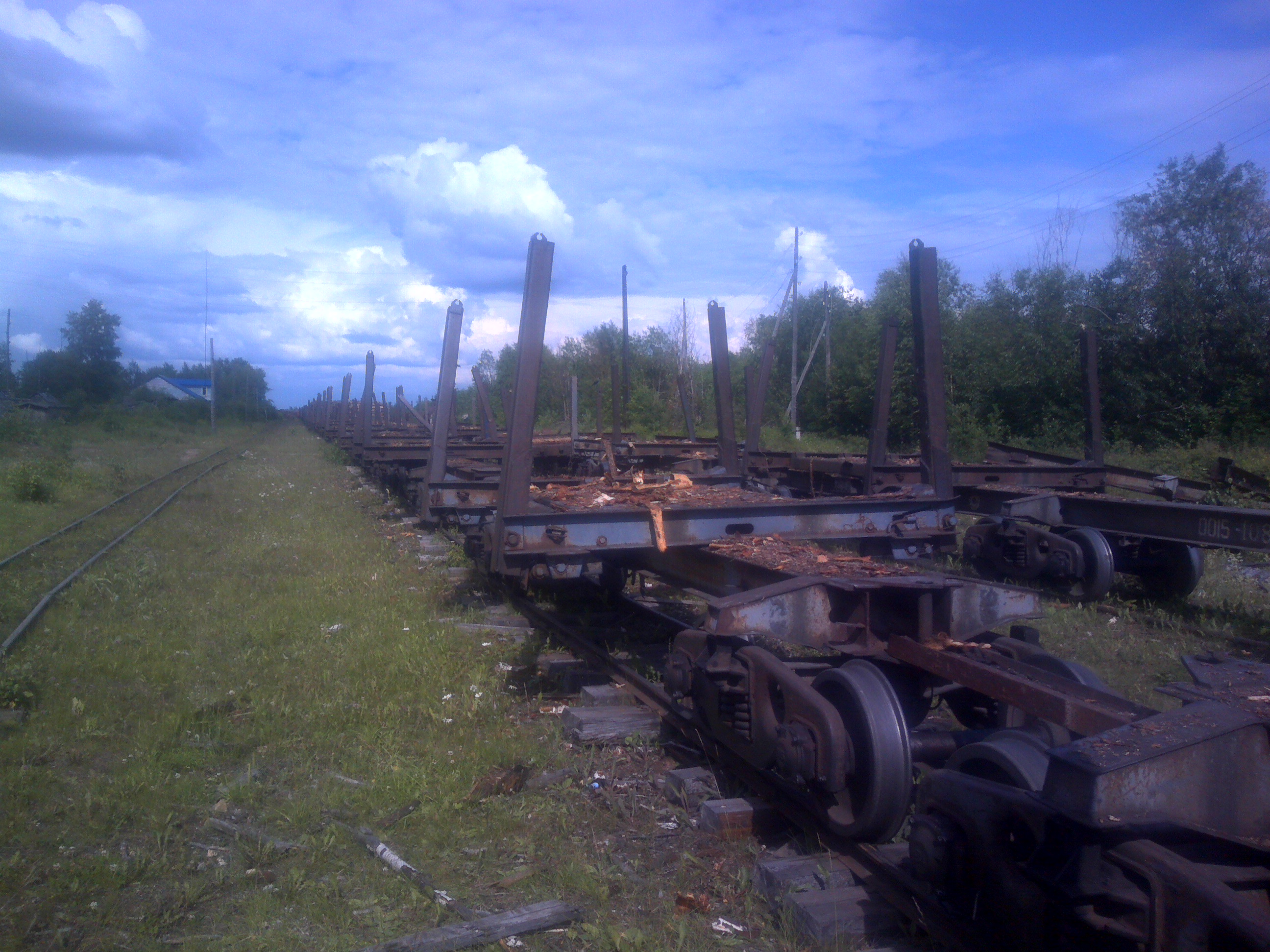 Нюбская УЖД, посёлок Харитоново